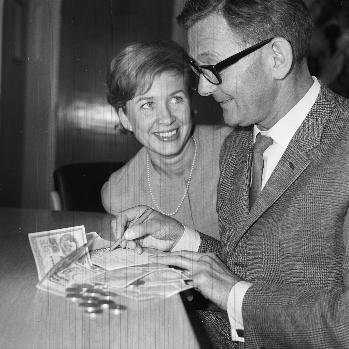 Odd Grythe og Ada Haug.